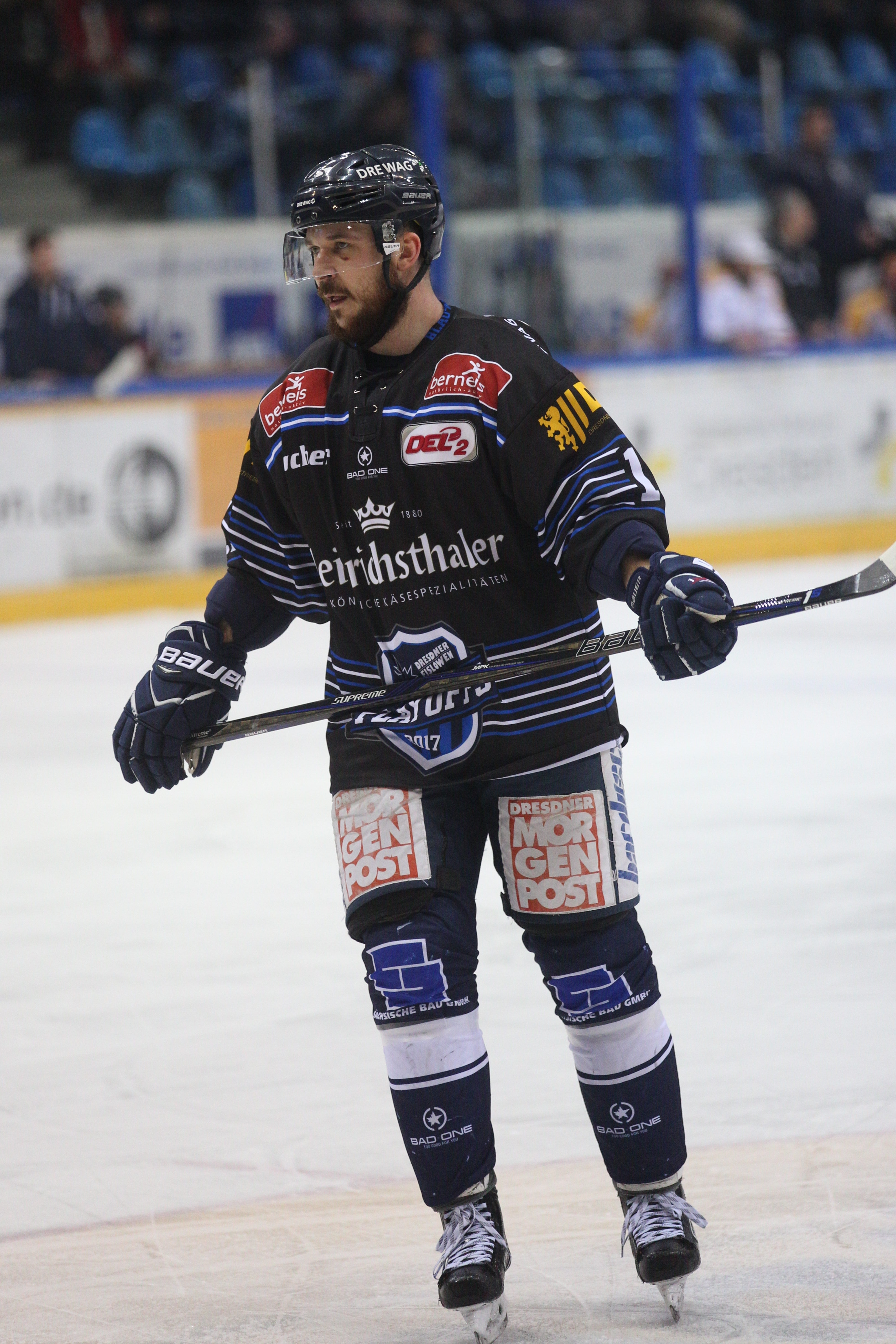 DEL 2 Play-off-Spiel Dresdner Eislöwen gegen ESV Kaufbeuren (1:4) am 14. März 2017 in der EnergieVerbund-Arena, Dresden